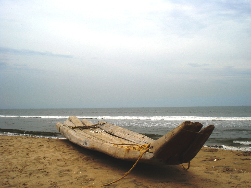 catamaran boat,cuddalore.tamilnadu